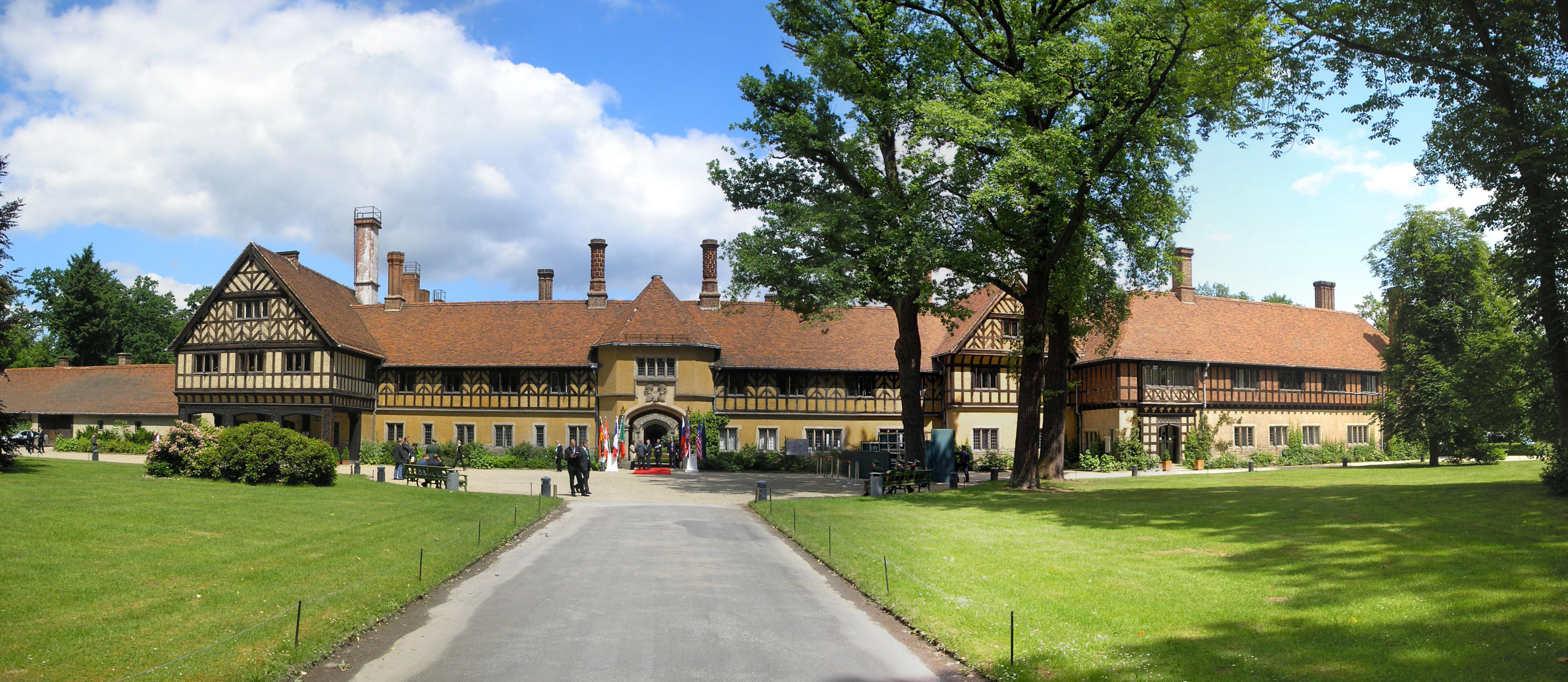 Schloss Cecilienhof in Potsdam